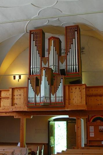 Orgue de la Maison Kuhn de Männedorf, église d'Andeer, photo de vacances